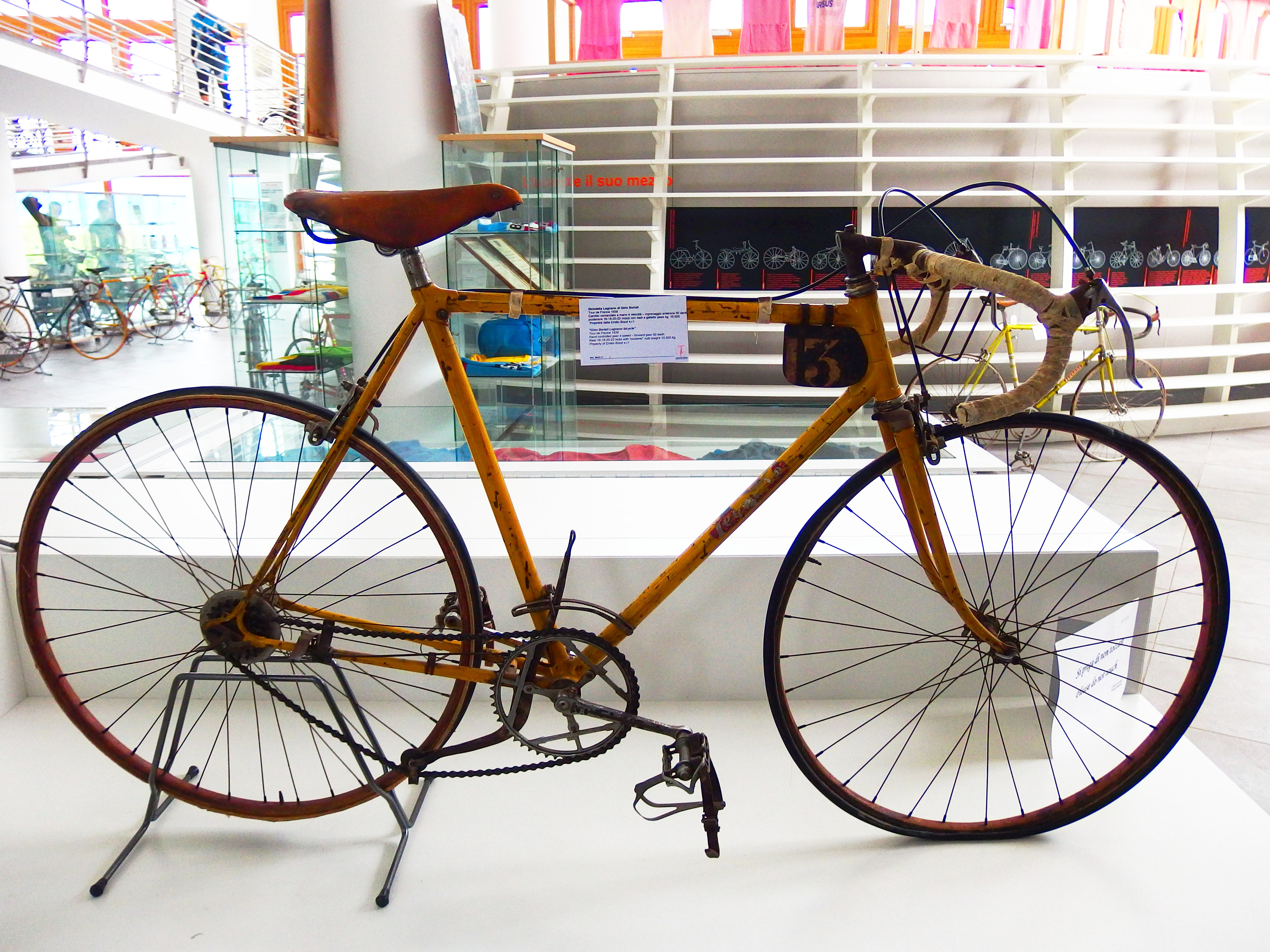 Rennrad von Gino Bartali, mit dem er die Tour de France 1938 bestritt